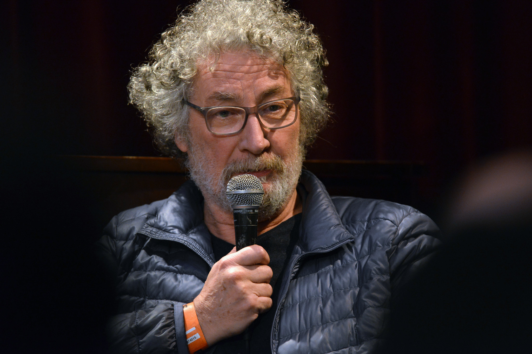 L'auteur français de bande dessinée Régis Loisel au Festival International de la Bande dessinée d'Angoulême 2019.